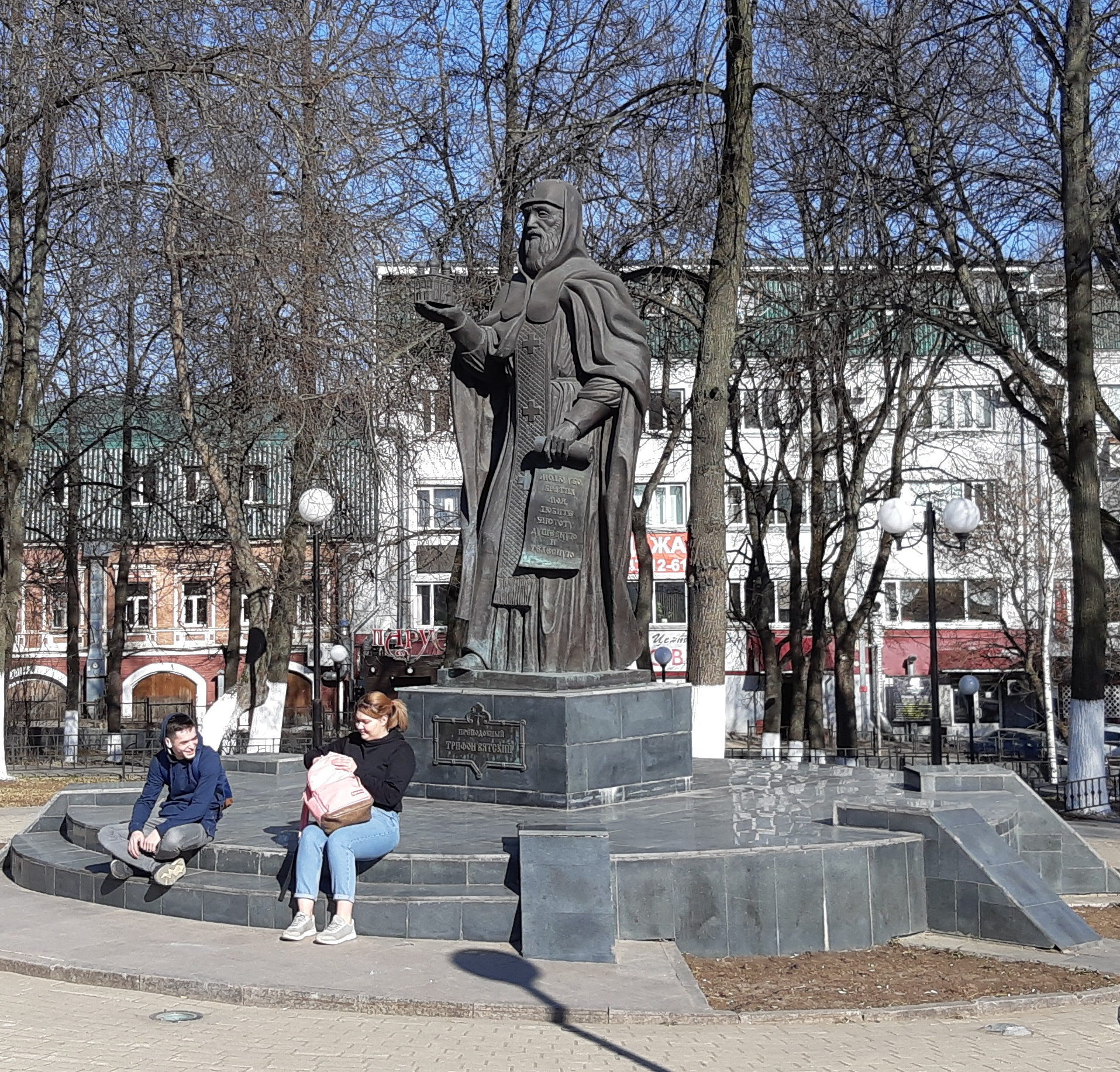 Преподобный Трифон Вятский. Киров 2019.